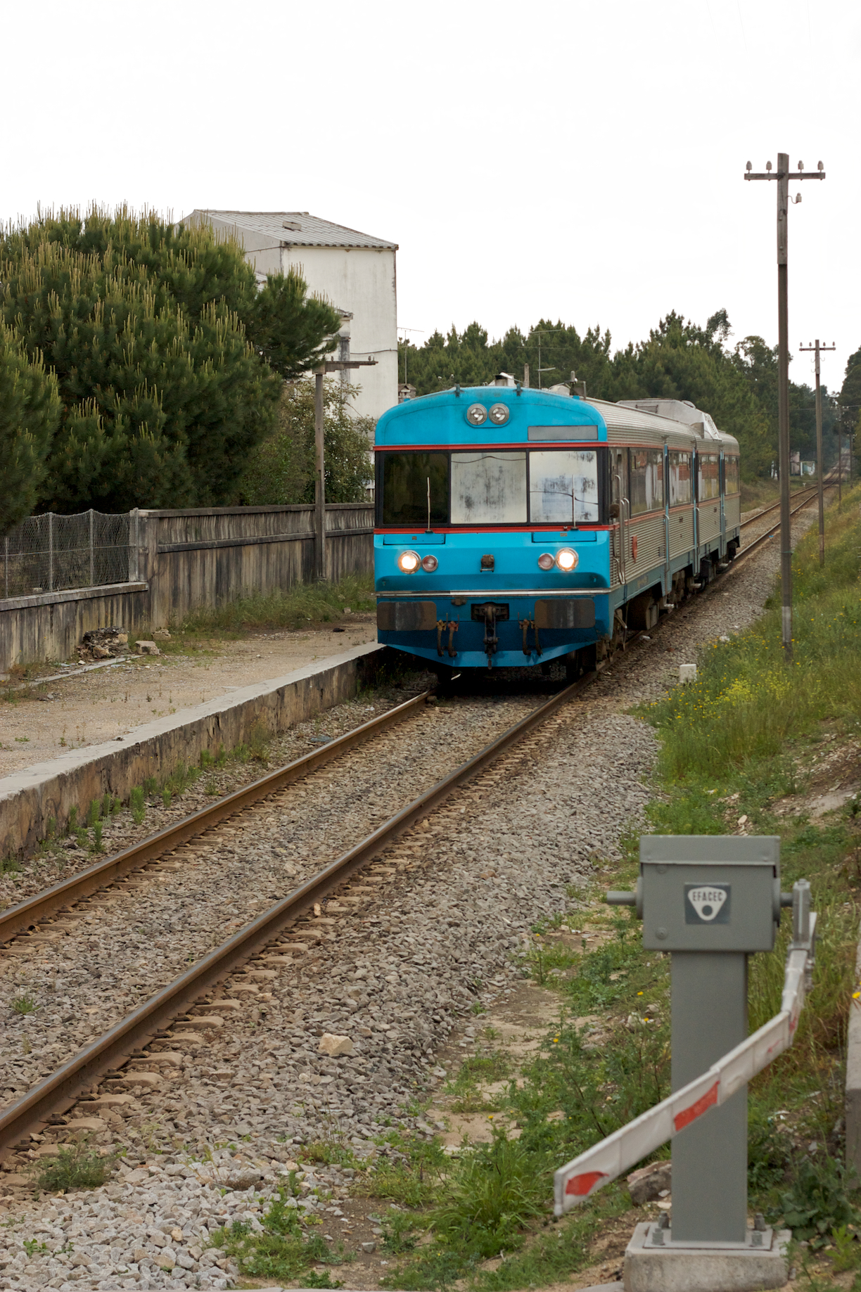 Tipo: Comboio Regional 6459/8 [Figueira da Foz - Caldas da Rainha] Local: Pataias Gare [Linha do Oeste, PK 139] Data e hora: 10 de Maio de 2009 [17h30] Material: Automotora 04xx [Unidade Dupla Diesel]